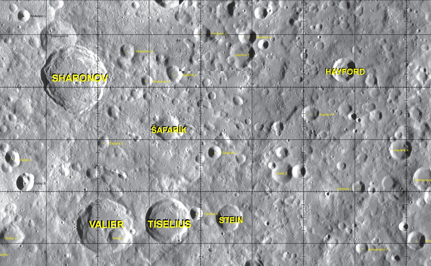 Cráter lunar Šafařík. Localización. (Imagen LRO)